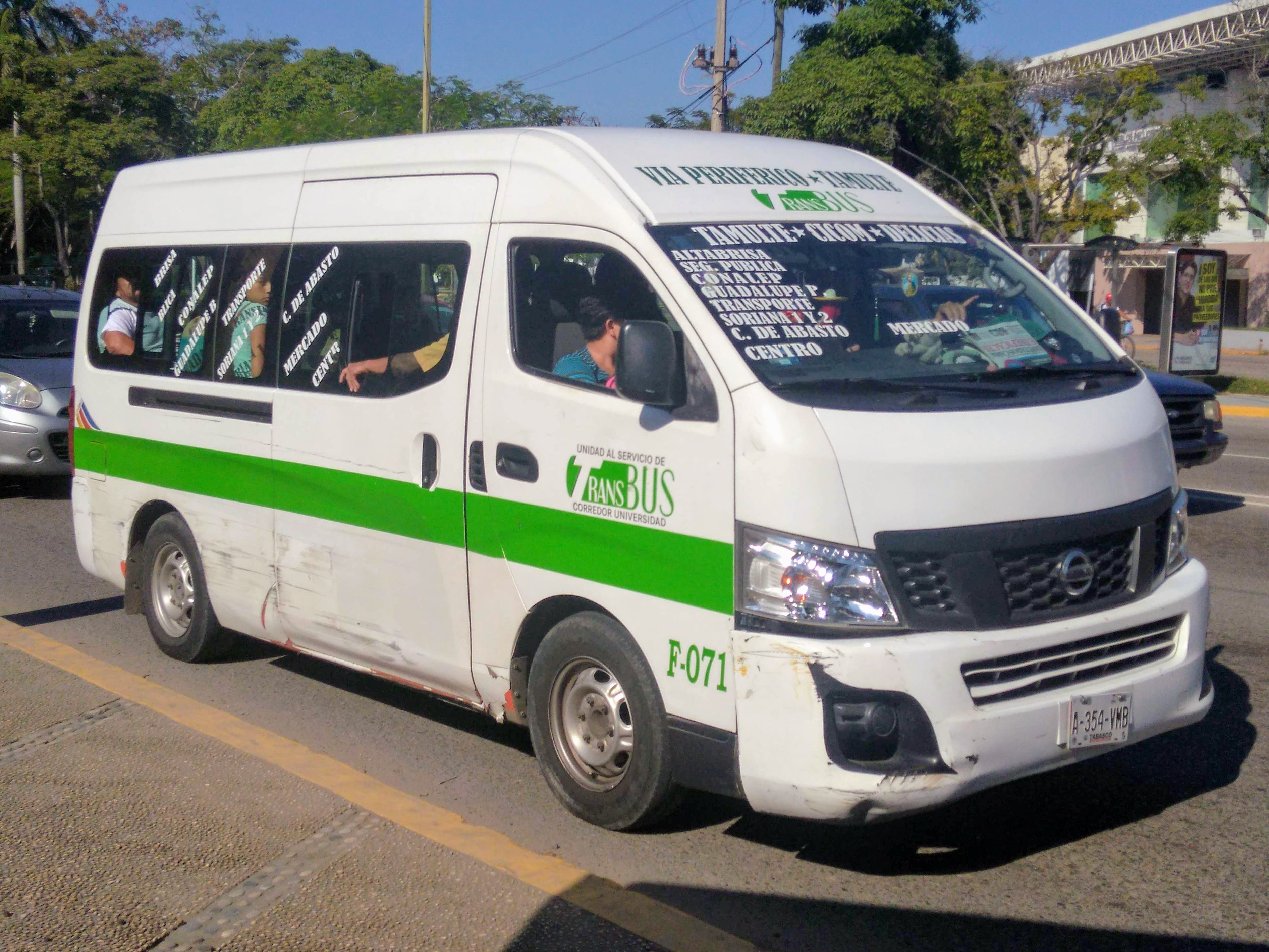 Unidad tipo urvan que suplen a las unidades del Transbús